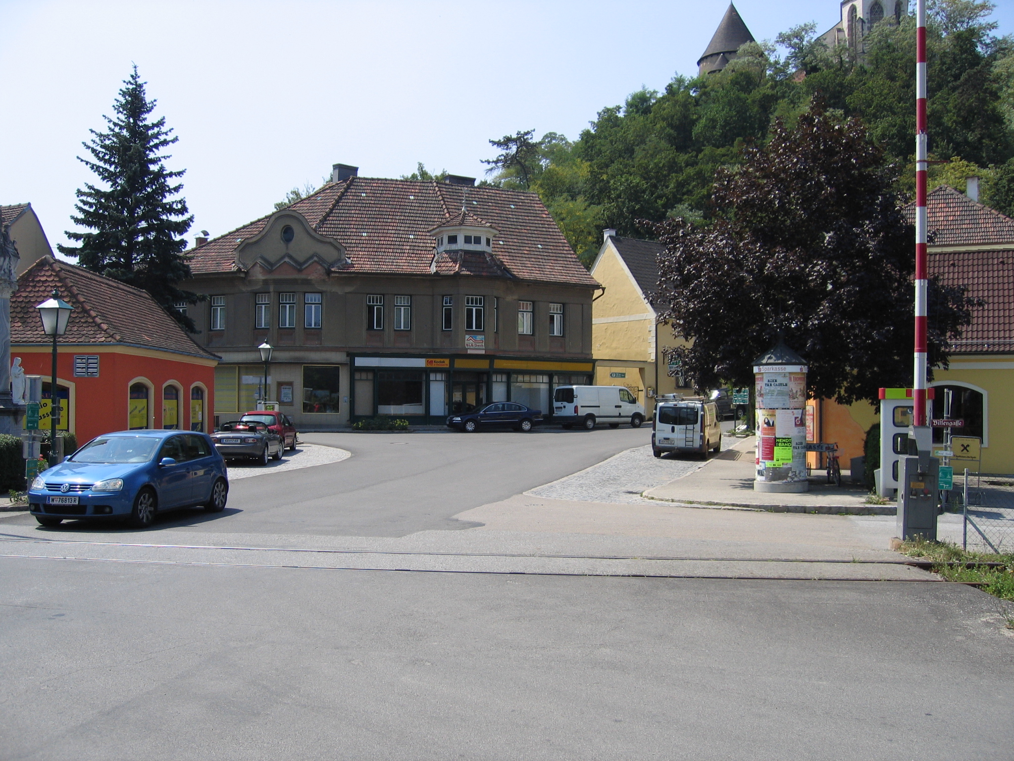 Der Bereich, der in Thunau am Kamp entlang der Babenbergerstraße und Sankt-Leonhard-Straße sowie zwischen Villengasse und Taborgasse liegt, war Jahrzehnte lang gleichsam der Thunauer Hauptplatz. Dort hat sich rund ein Jahrhundert lang das Warenhaus von Georg Obenaus befunden, der als Thunauer Konkurrent von Julius Kiennast die gesamte Produktpalette des täglichen Lebens angeboten hat: Lebensmittel, Schulsachen, Bekleidung etc.